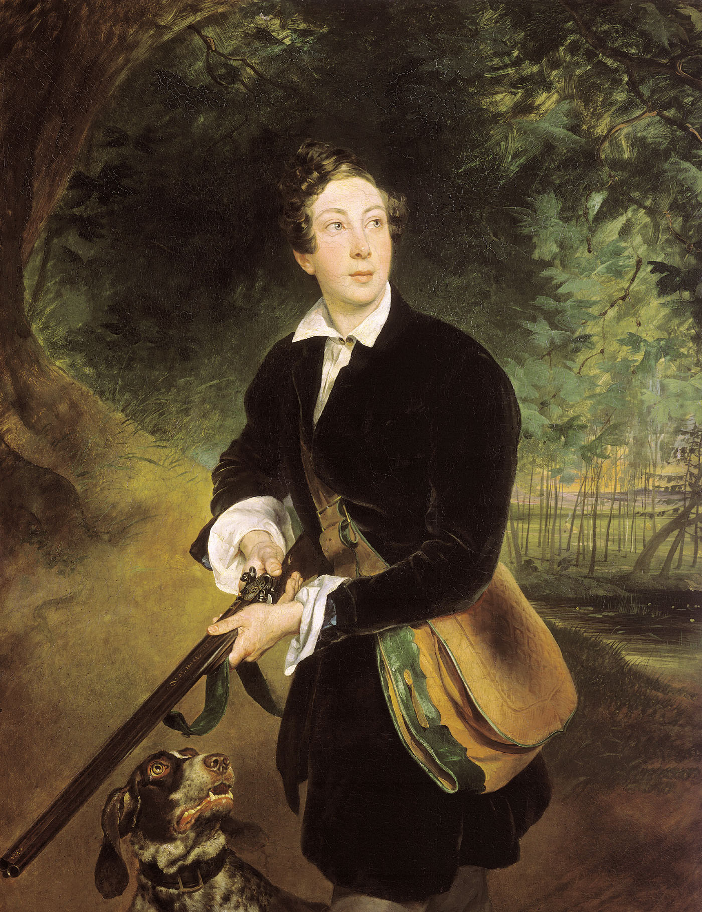 Портрет поэта и драматурга Алексея Константиновича Толстого в юности.